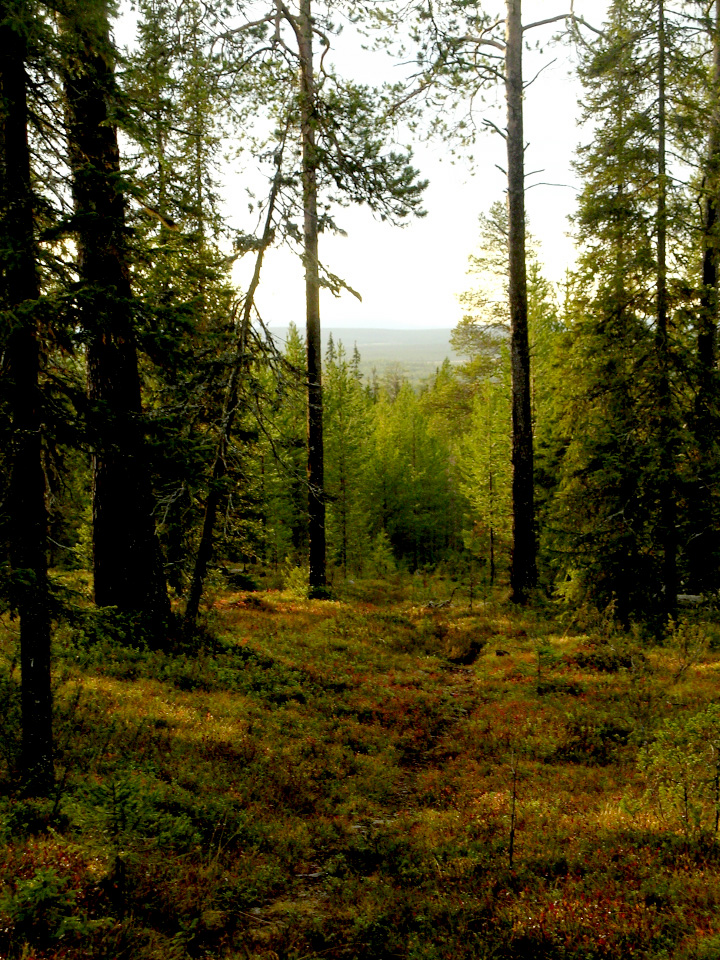 Kittiläko Kumpu muinoa